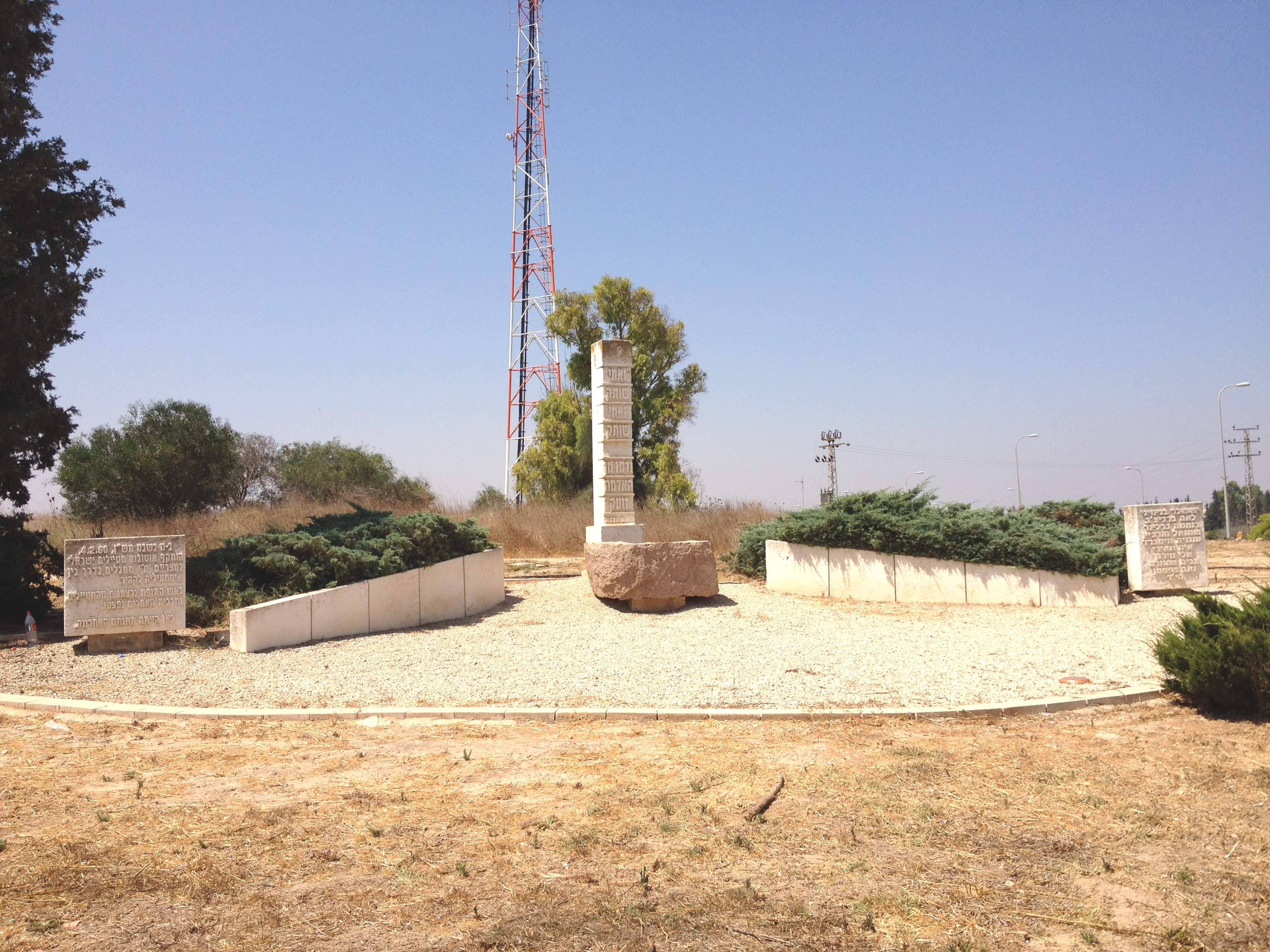 צומת יד מרדכי צומת יד מרדכי האנדרטה לזכר חללי הפיגוע במצרים 1990